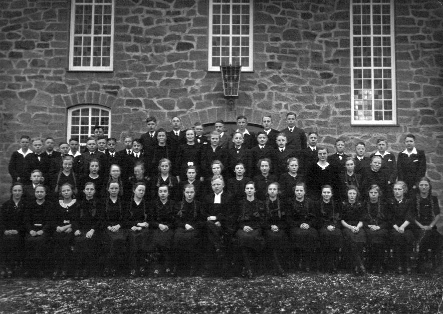 die erste Konfirmation in der neuen evang.-luth. Kirche zu Oetinghausen (Kreis Herford)